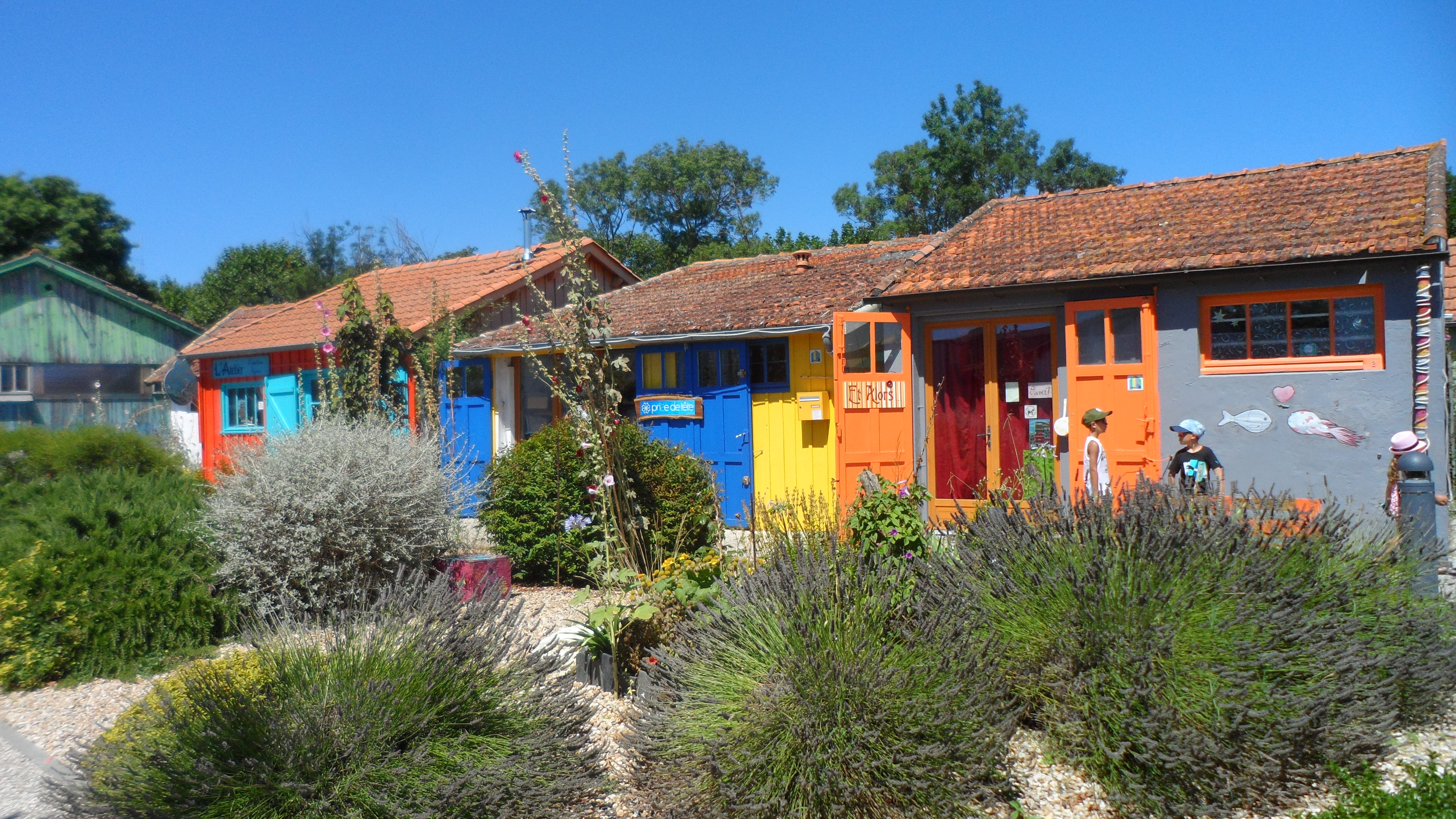 Cabanes d'artistes et créateurs derrière un trottoir végétal.